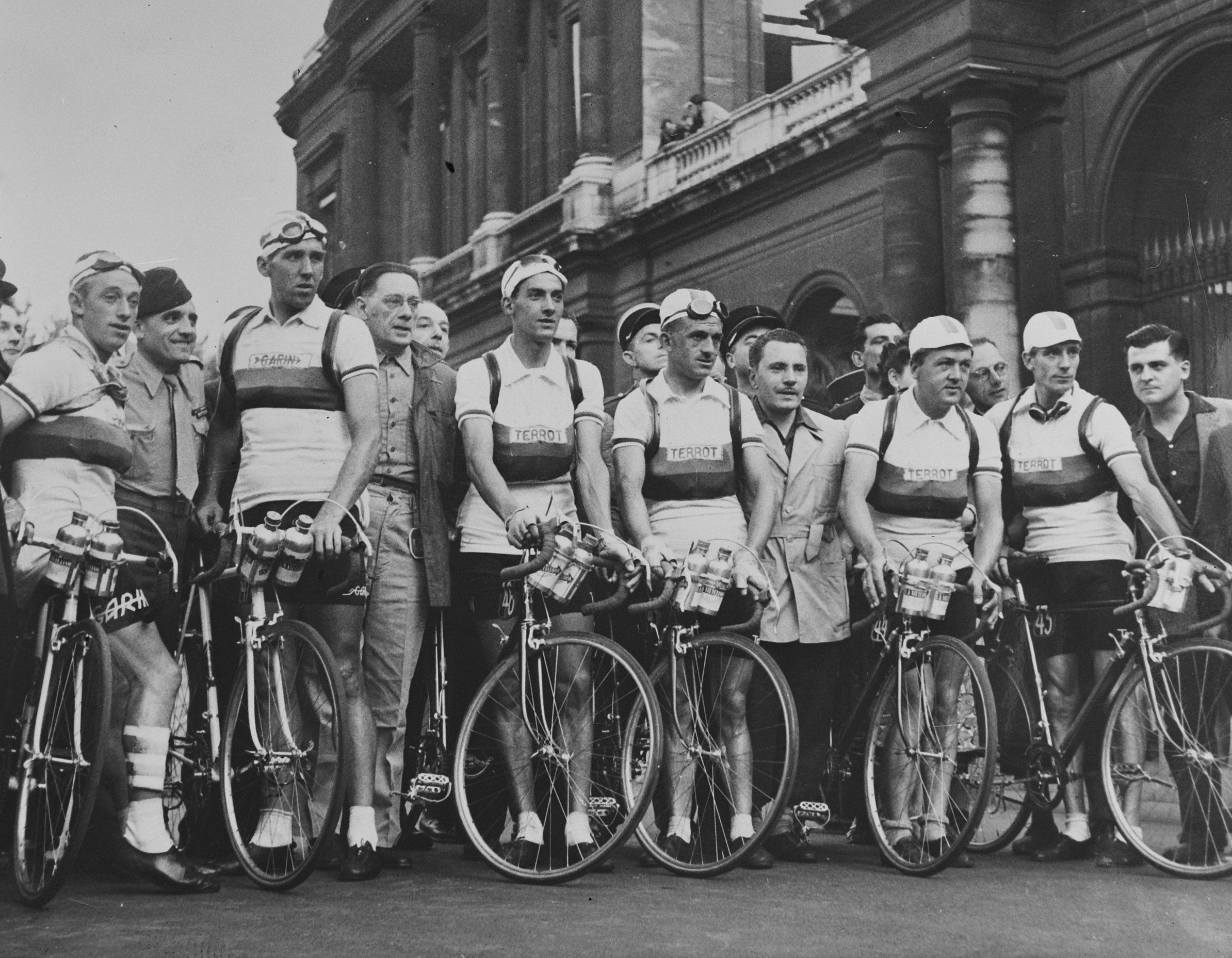 De Nederlandse ploeg bij de start in Parijs.